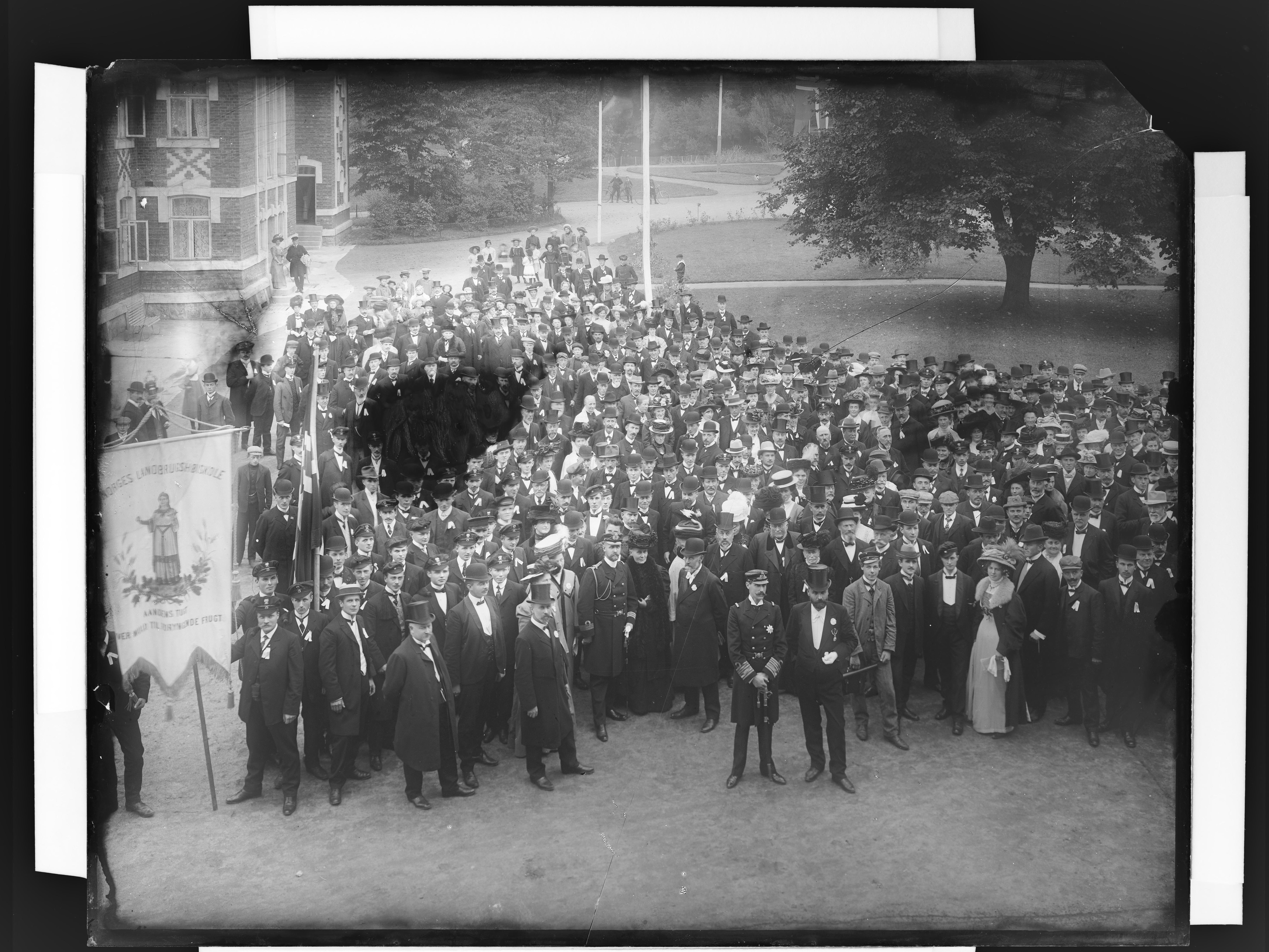 Bildet er hentet fra Nasjonalbibliotekets bildesamling Ås, Akershus